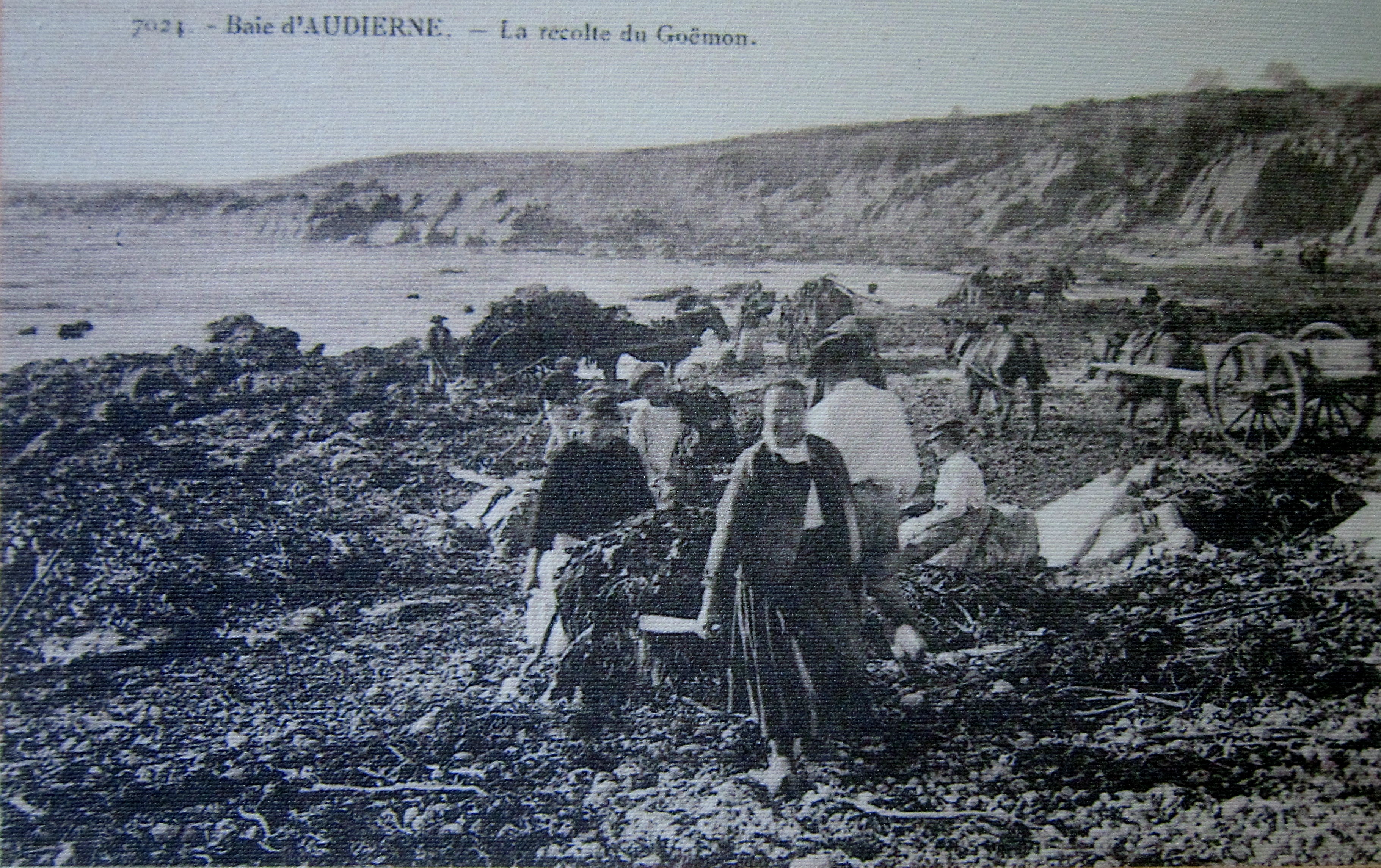 La récolte du goémon en Baie d'Audierne vers 1920 (carte postale, auteur inconnu).